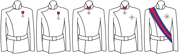 Modo di indossare le decorazioni dell'Ordine Militare di Savoia (Regno d'Italia)